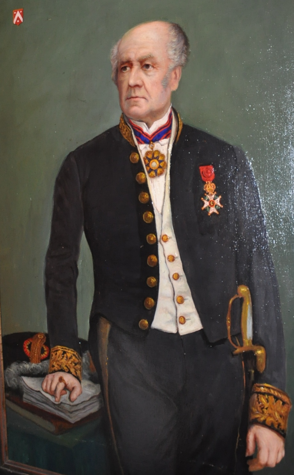 Portrait d’ Armand Wasseige